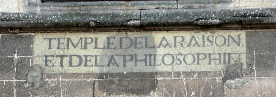 Inscription relative au culte de la Raison et de l'Être suprême sur un mur de l'Église d'Ivry-la-Bataille (1792-1794).